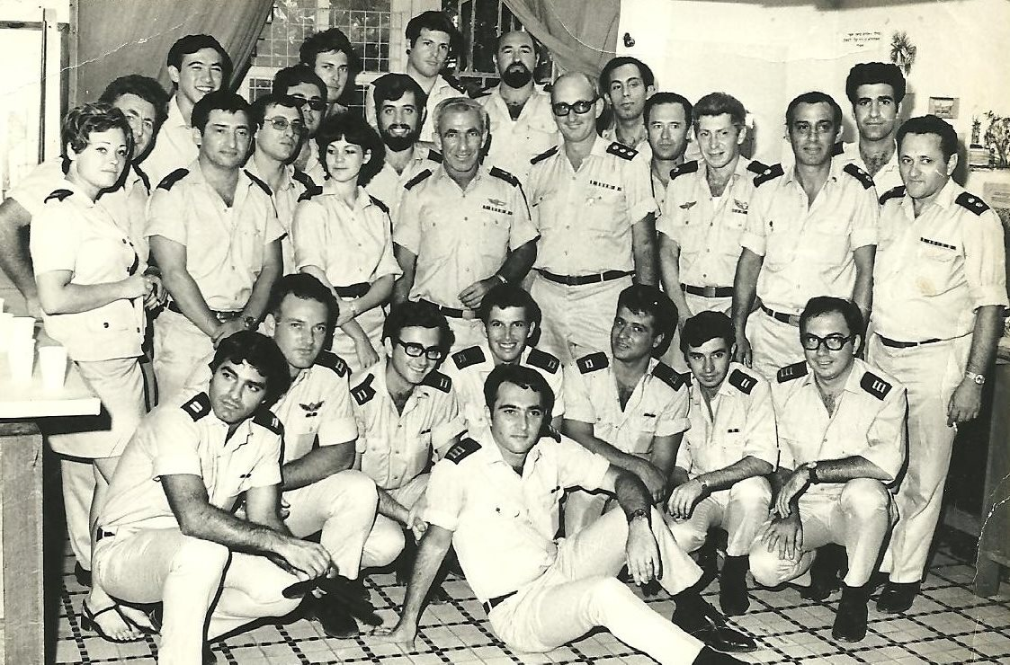 סגל הקצונה של המודיעין הימי קיץ 1972. שני מימין (למטה): סגן מאיר טולידאנו.